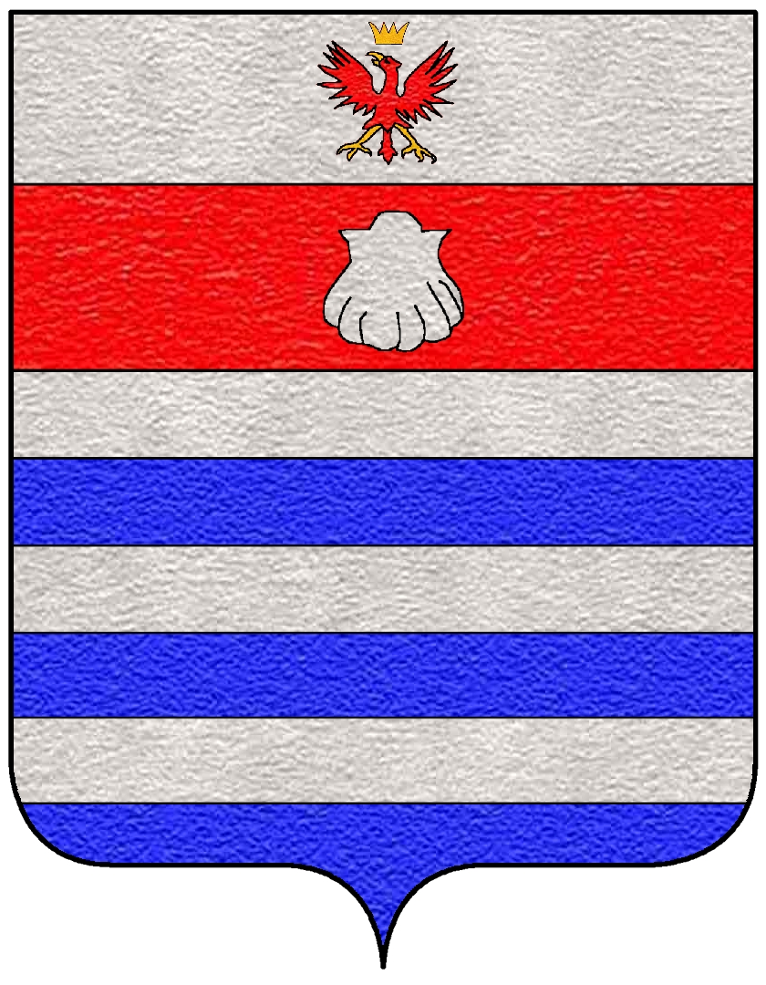 Stemma della famiglia Rangoni